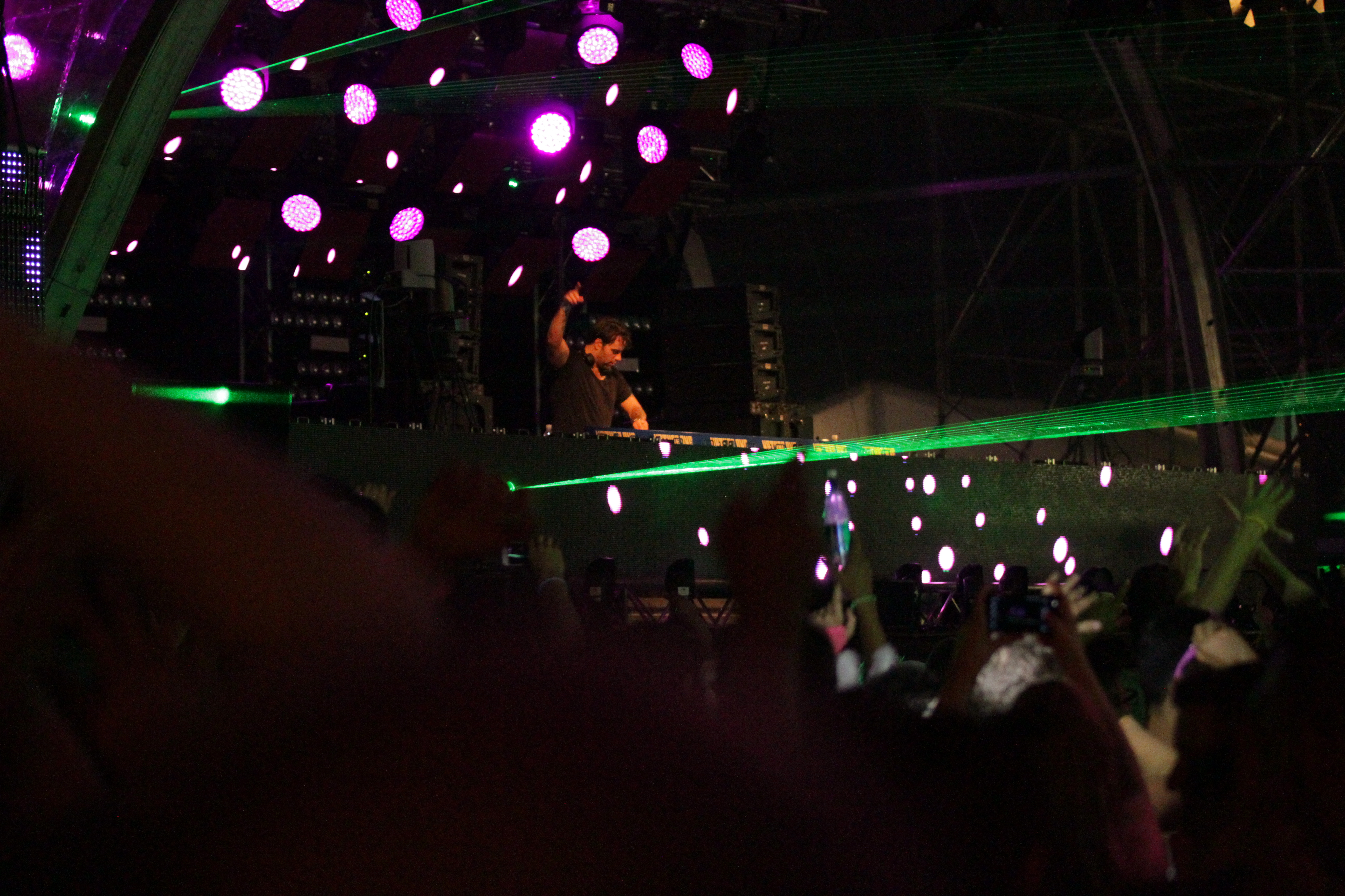 Sebastian Ingrosso auf dem Open Air Floor.